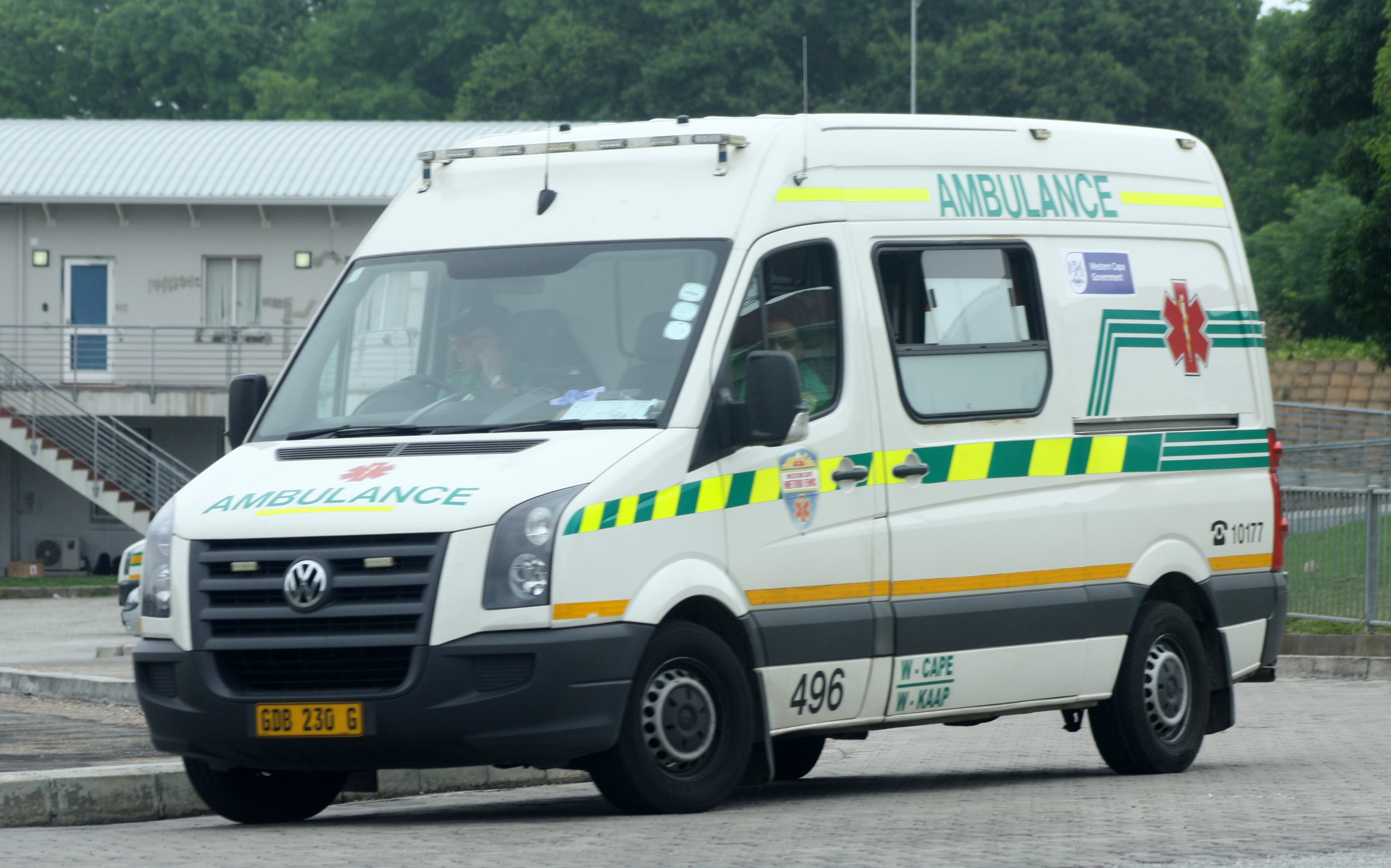 Western Cape Metro EMS Volkswagen Crafter TDI ambulance